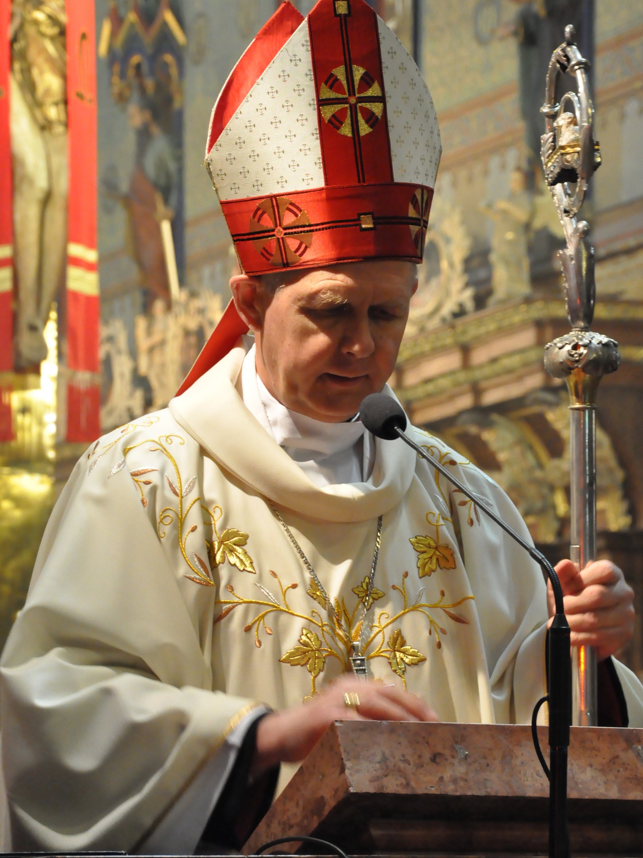 abp Peta